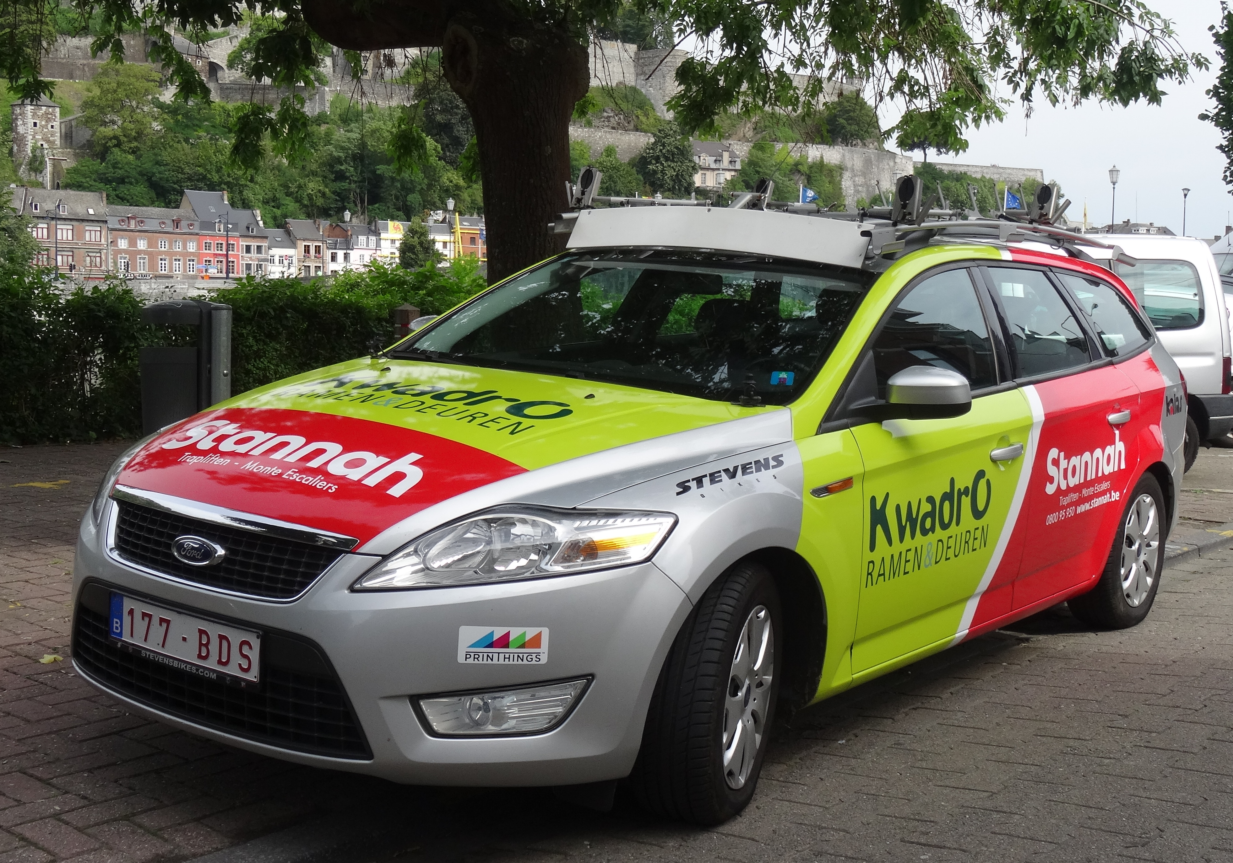 Reportage photographique réalisé le mercredi 6 août à l'occasion du départ de la première étape du Tour de la province de Namur 2014 à Jambes (Namur), Belgique.